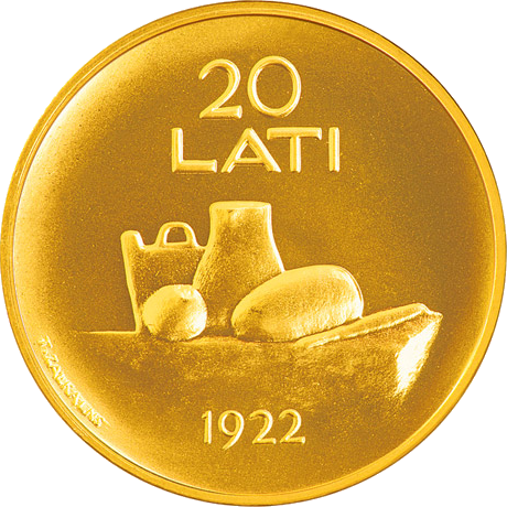 Latvian commemorative coin